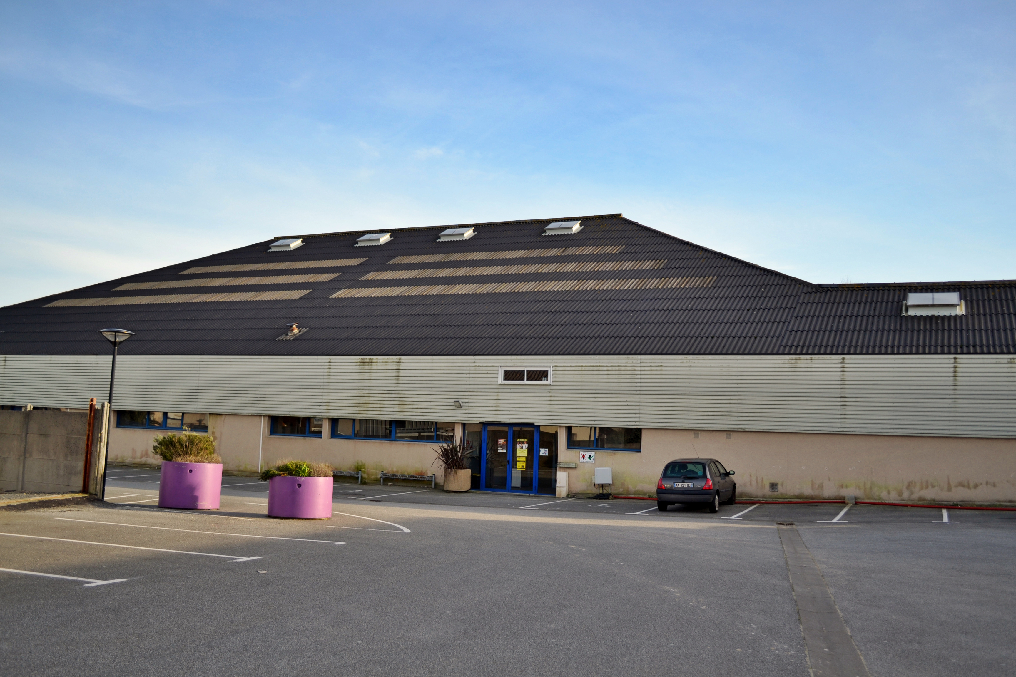 Salle omnisports de Santec dans le Nord Finistère en Bretagne.